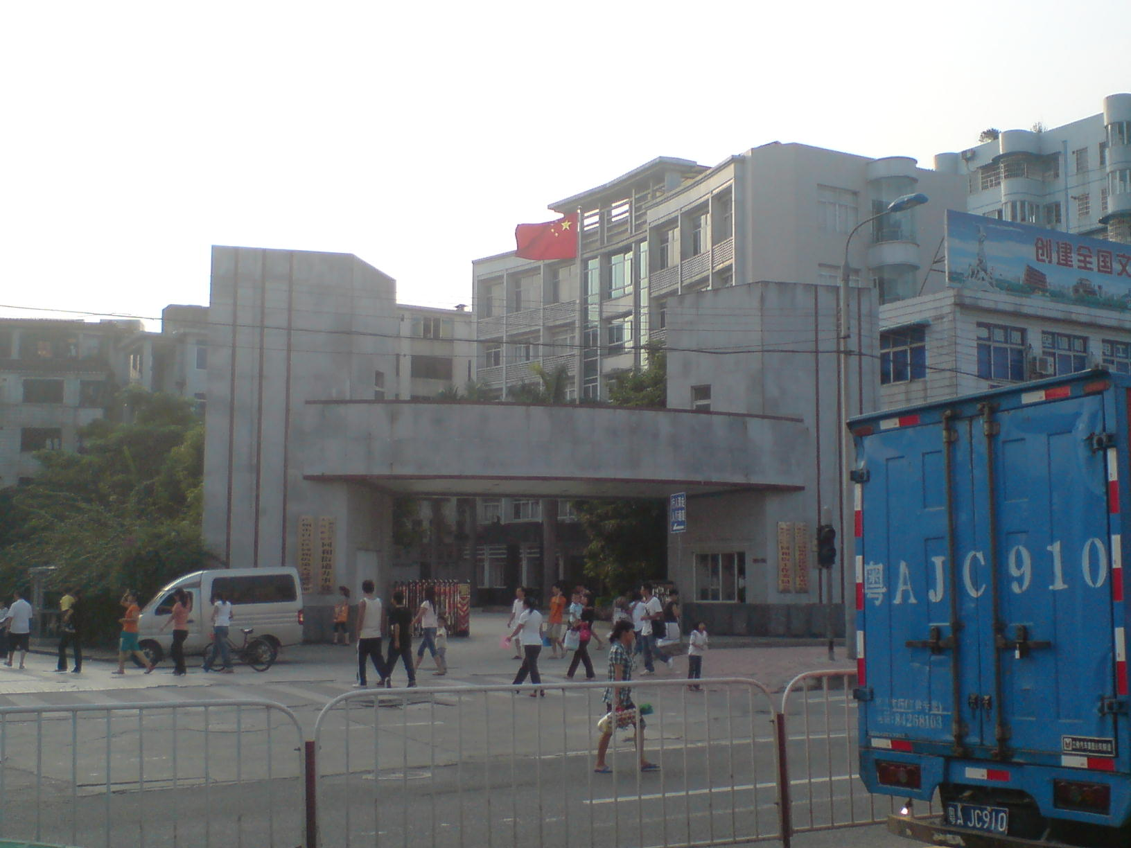 中文（中国大陆）: 广州白云区同和街道办事处